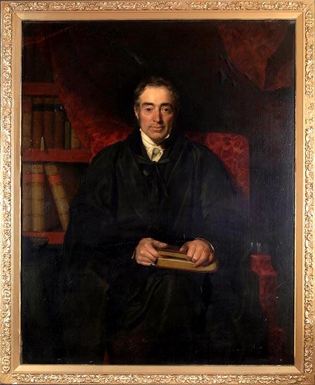 Der englische Orientalist Samuel Lee (1783-1852)